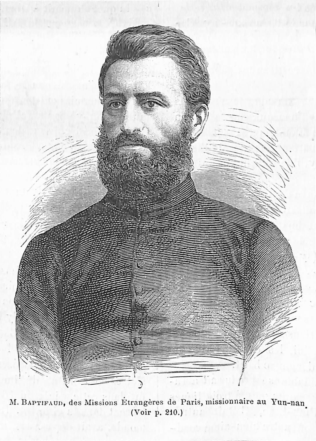 Jean Baptifaud (1845-1874) prêtre des missions étrangères de Paris, martyrisé au Yunnan.